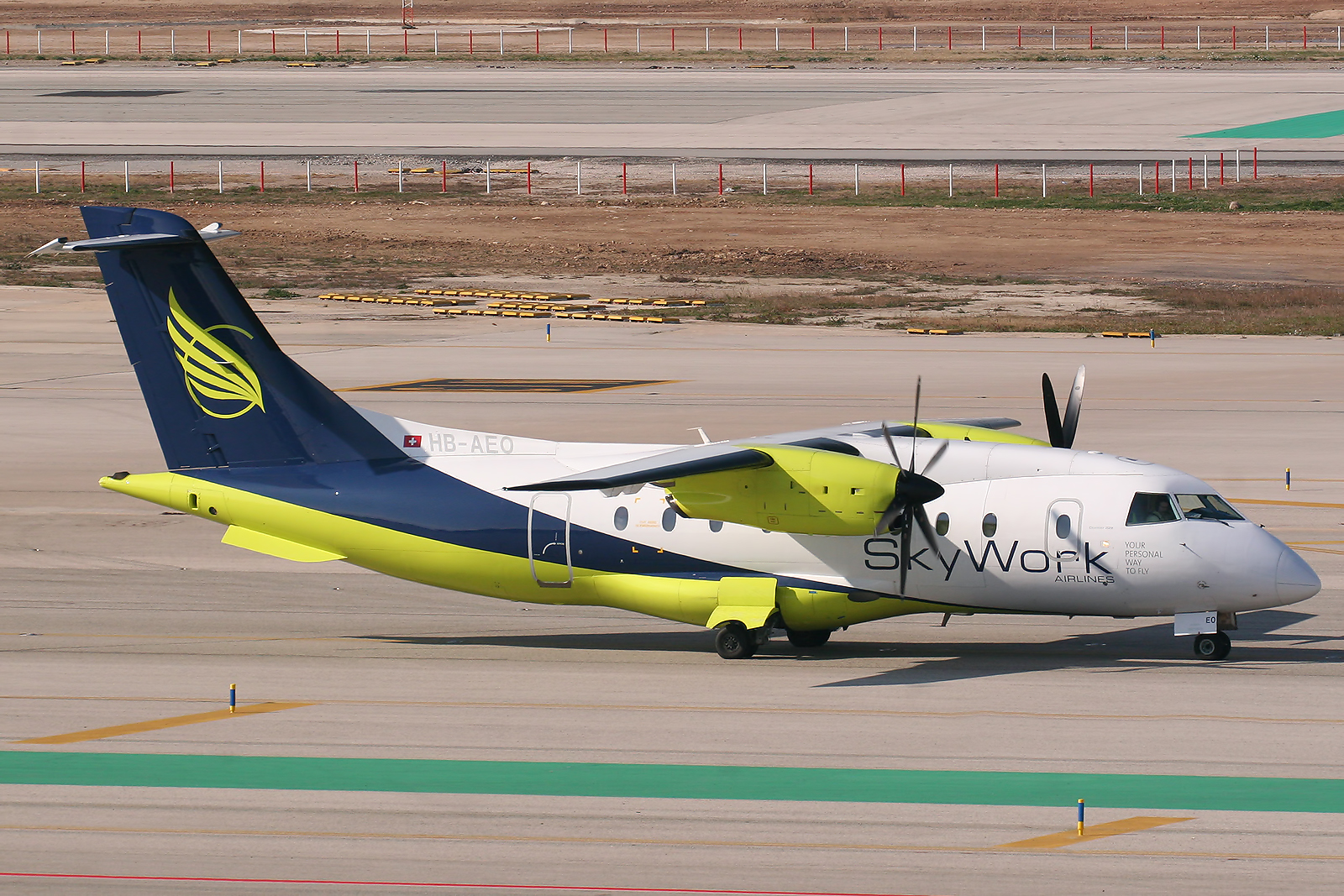 Barcelona El Prat (LEBL/BCN) Airport